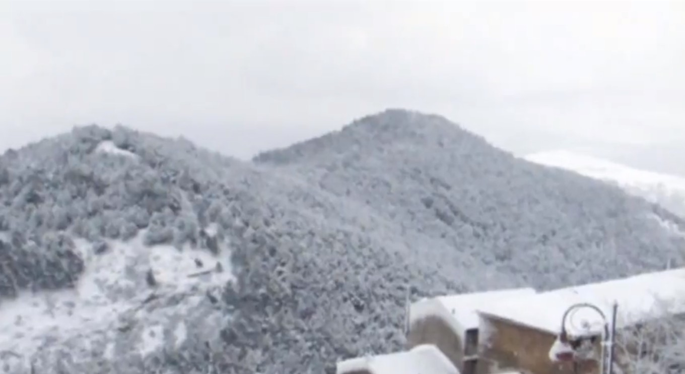 neve sui monti dauni-Sant'Agata di Puglia-febbraio 2012